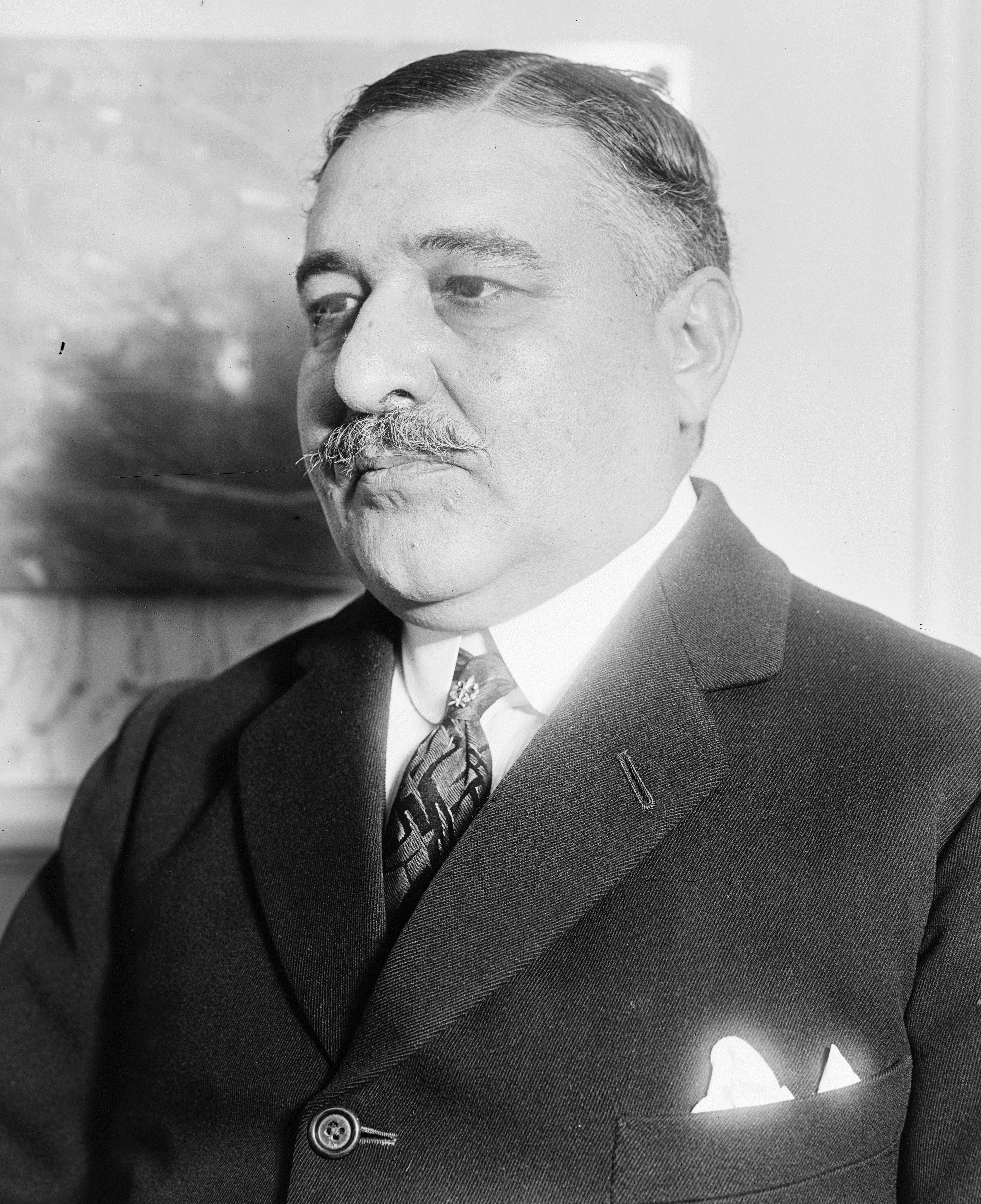 Léon Daudet, photographie de presse, agence Rol, juillet 1922.